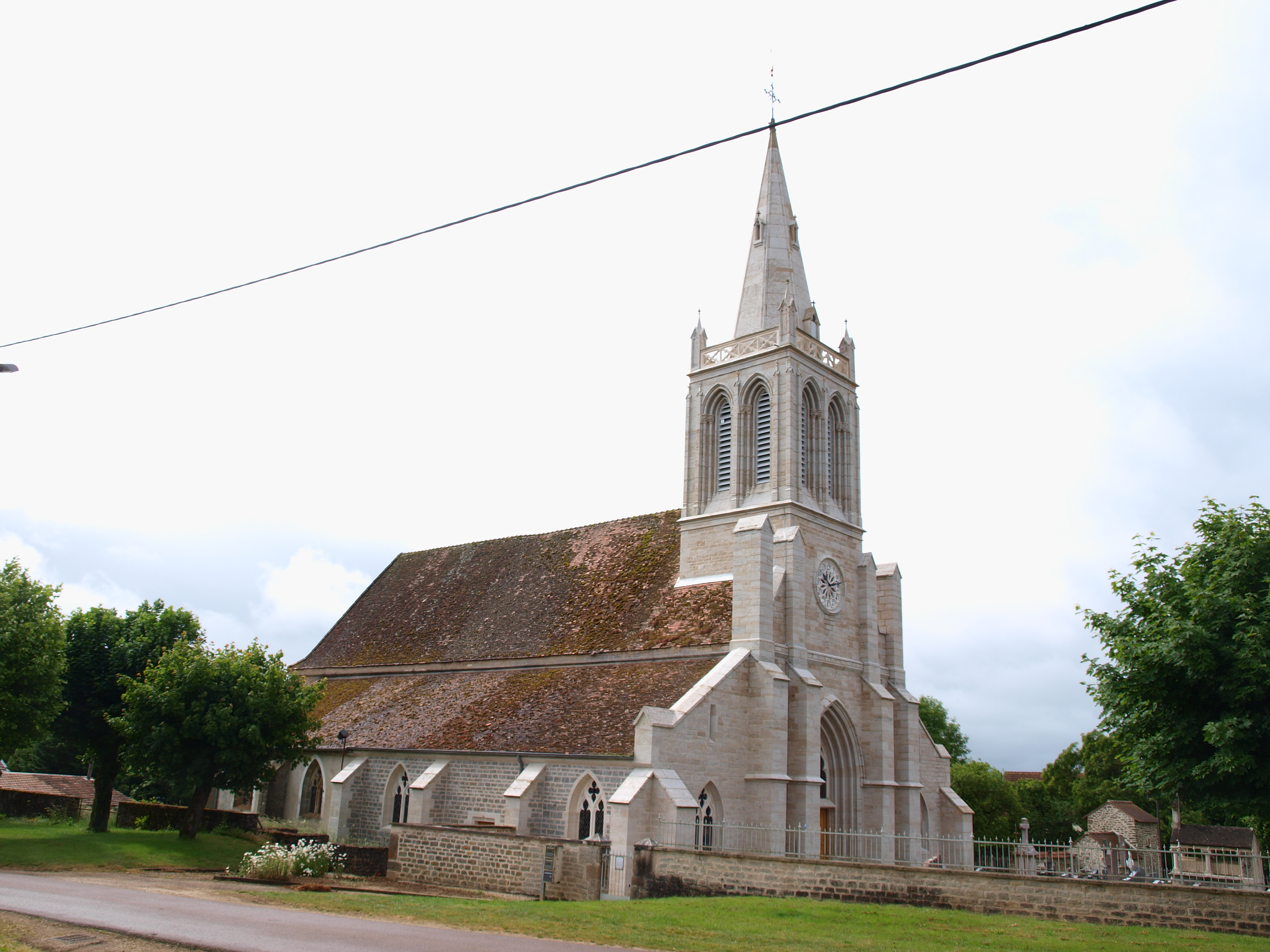 Sur les deux communes de Meilly-sur-Rouvres et de Rouvres-sous-Meilly